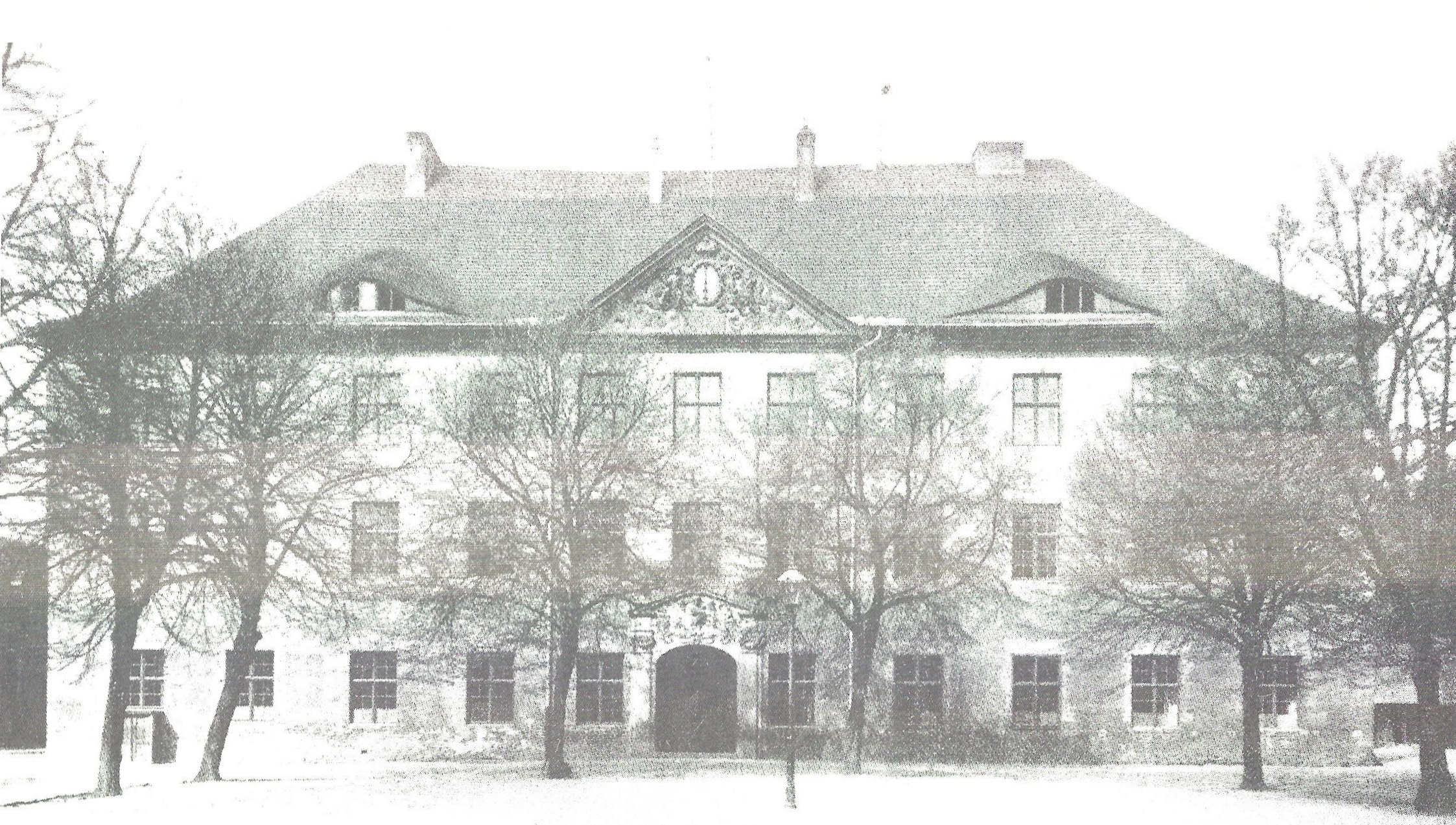 Hauptansicht des Kollegienhaus der Universität Frankfurt a. O., im wesentlichen noch in der Gestaltung von 1694.